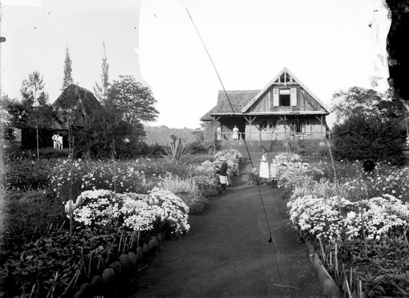 Kilimandscharo, Mission Massama